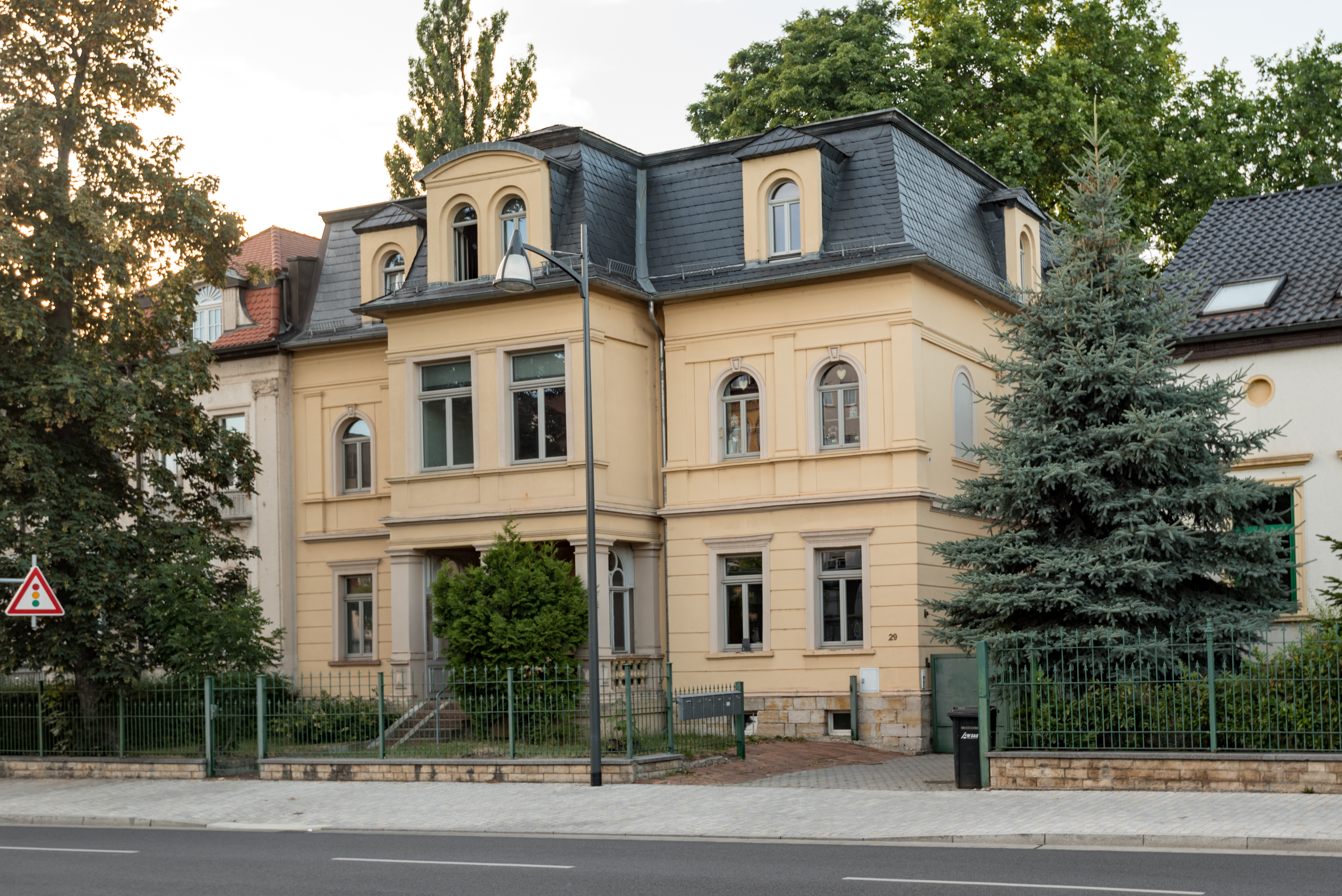 Weißenfels, Promenade 29